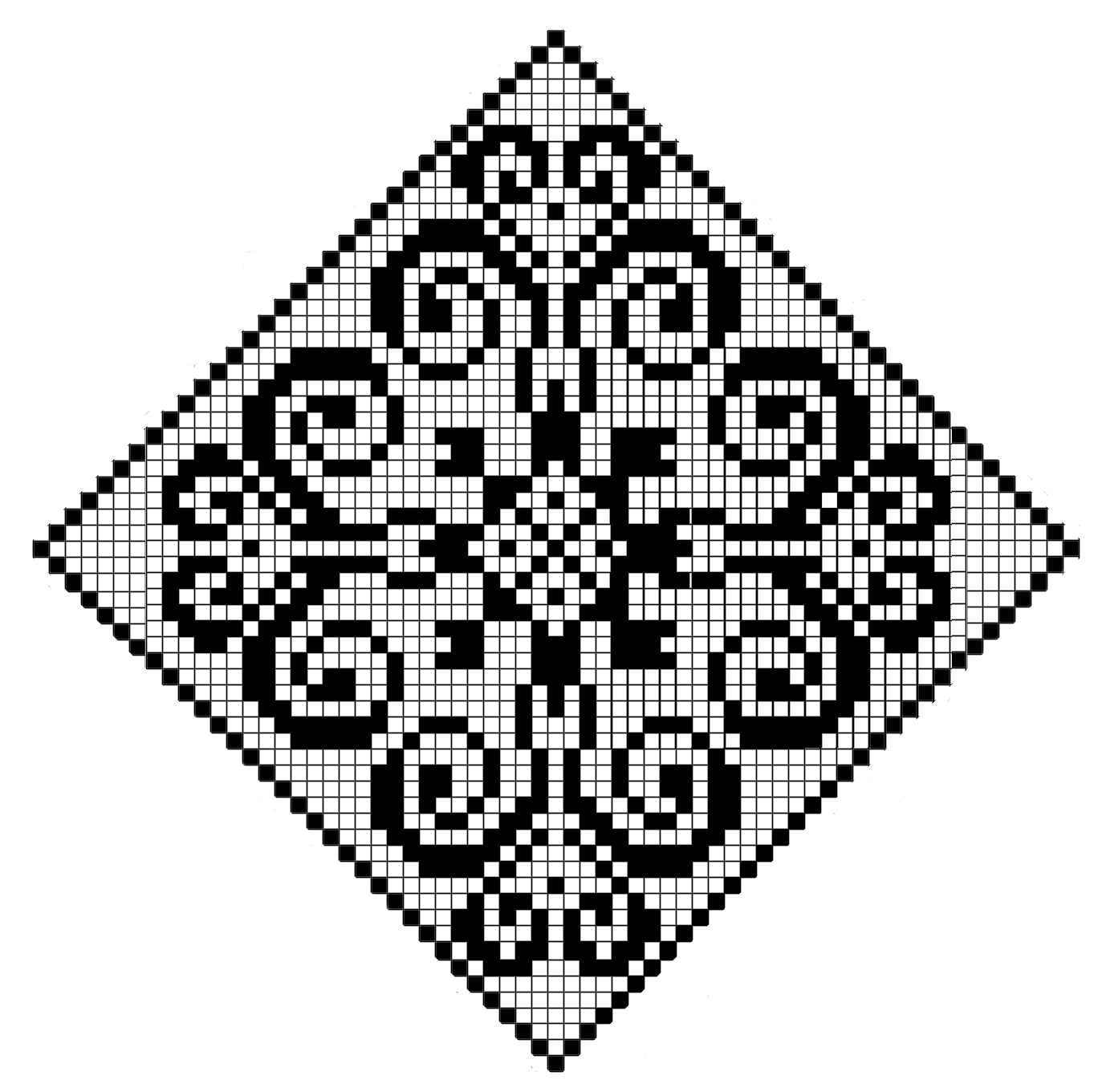 Motif tricot norvégien, verhaanrosa